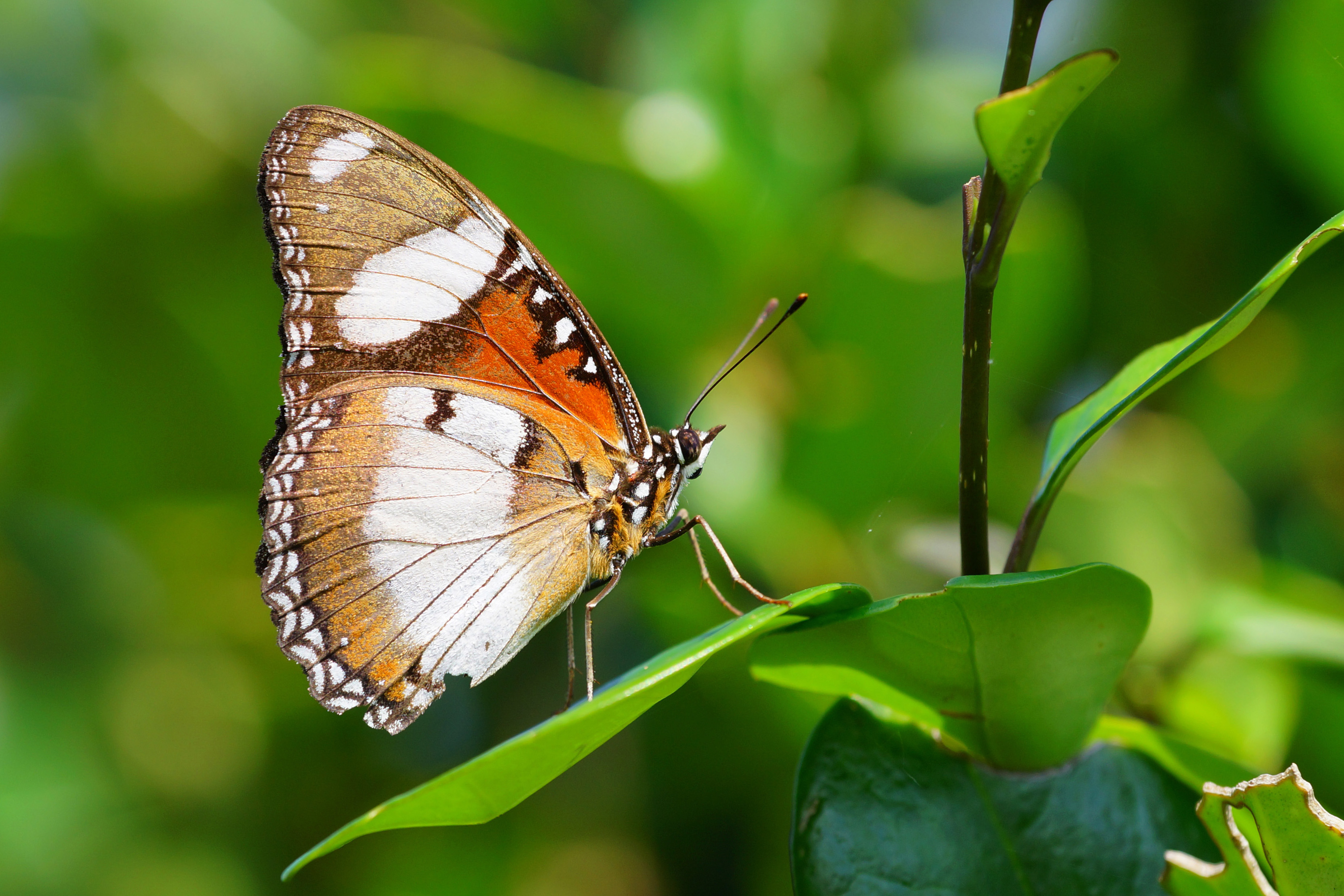 雌擬幻蛺蝶 Hypolimnas misippus